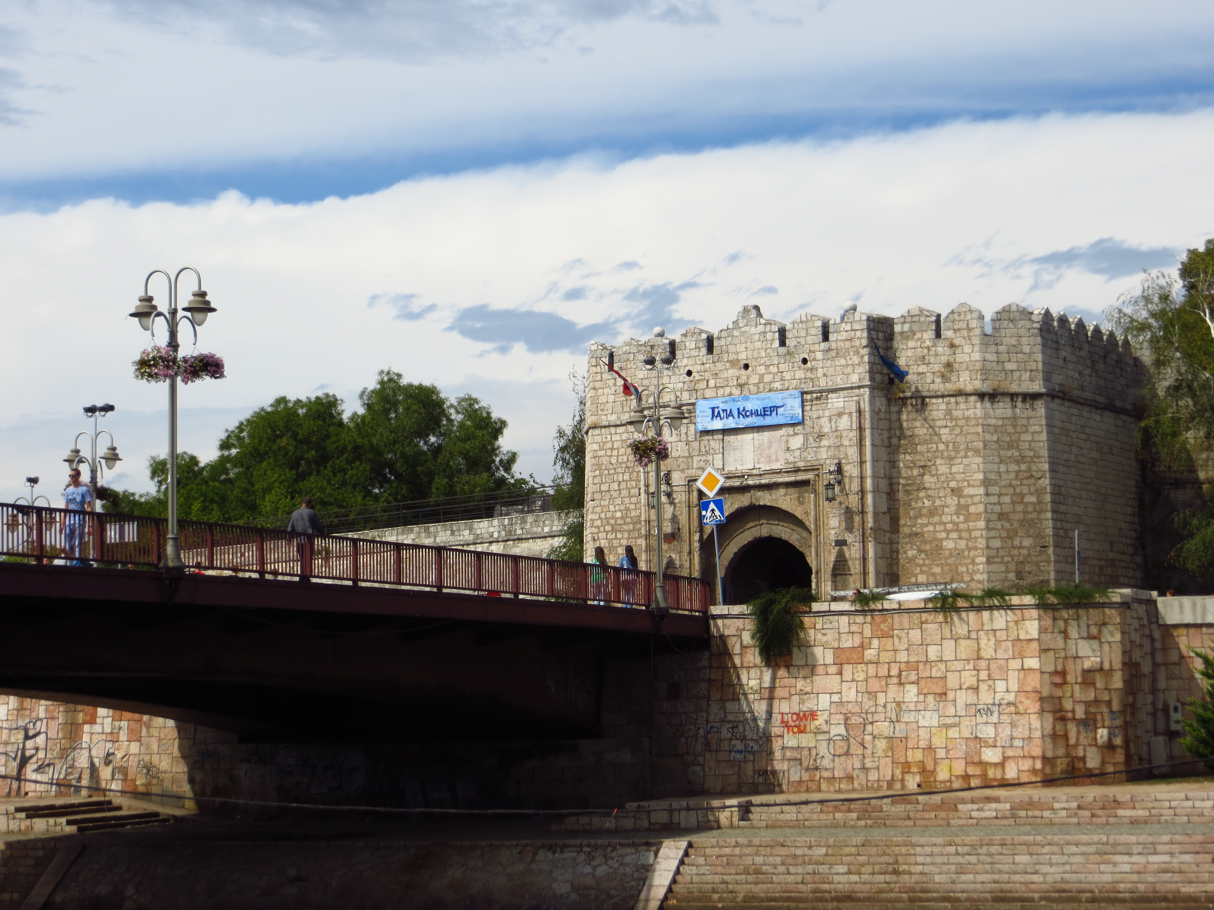 Pogled na glavnu ulaz u Nišku tvrđavu sa keja Nišave